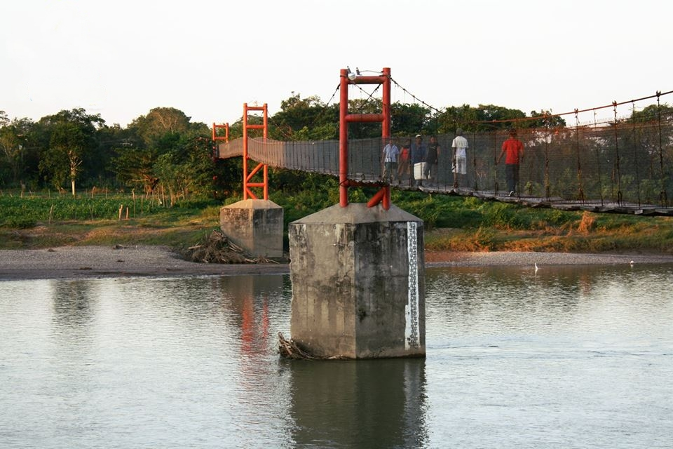 Calle